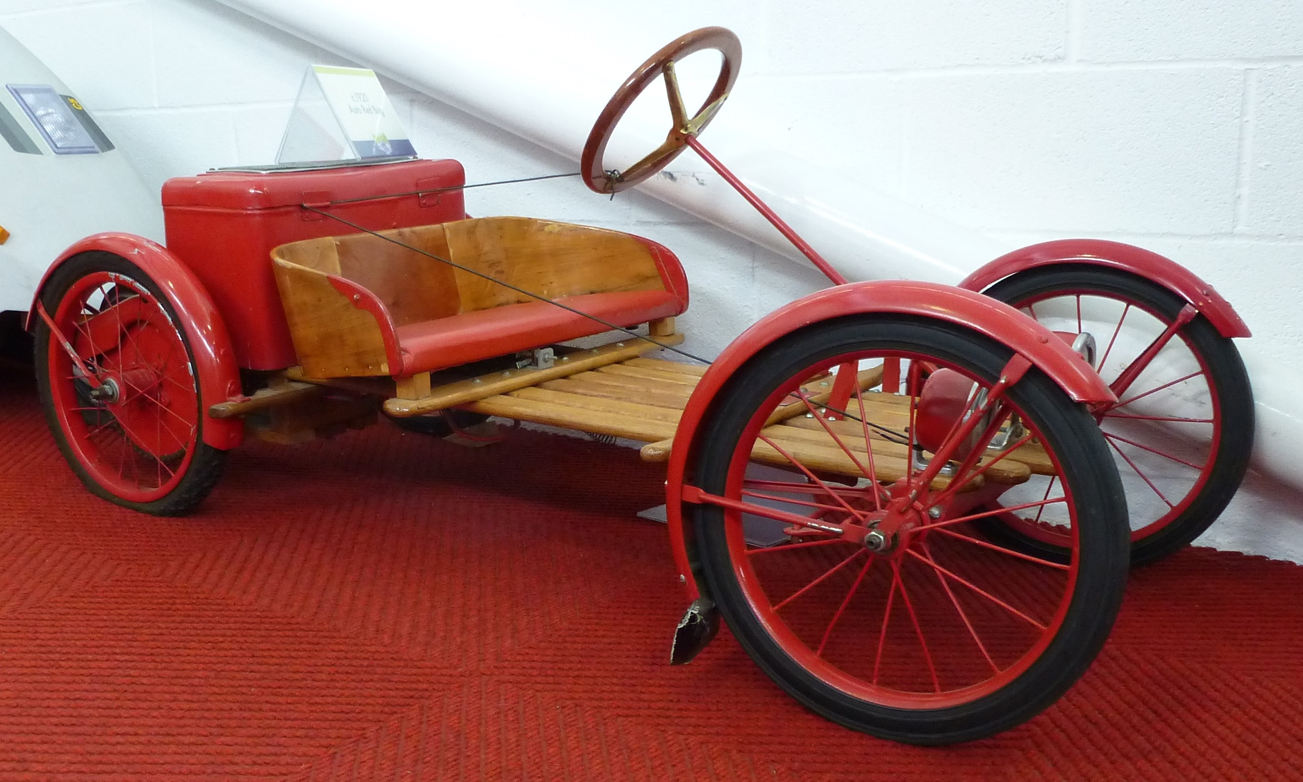 Red Bug von 1924–1930